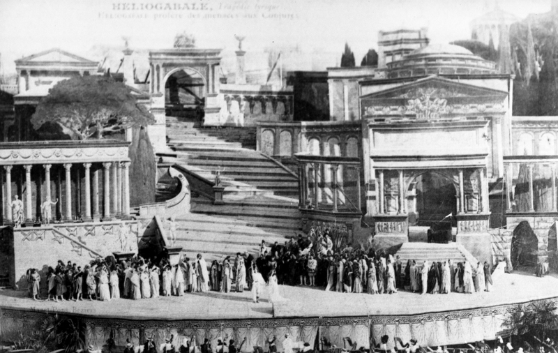 Carte postale éditée en 1910 lors de la représentation d'Héliogabale de Déodat de Séverac à Béziers, au Théâtre des Arènes.